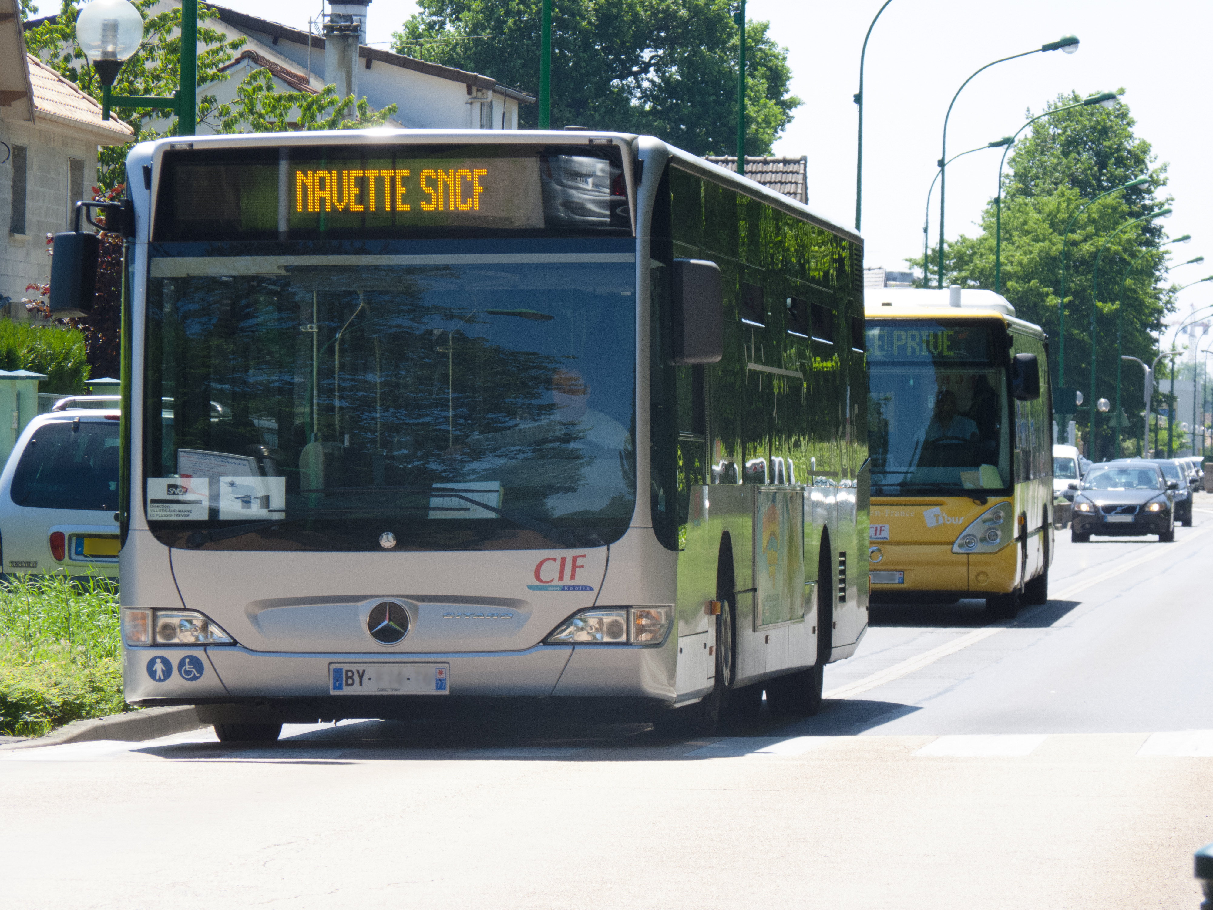 Navette de remplacement du RER E sortant d'Ozoir-la-Ferrière en direction de Villiers-sur-Marne.